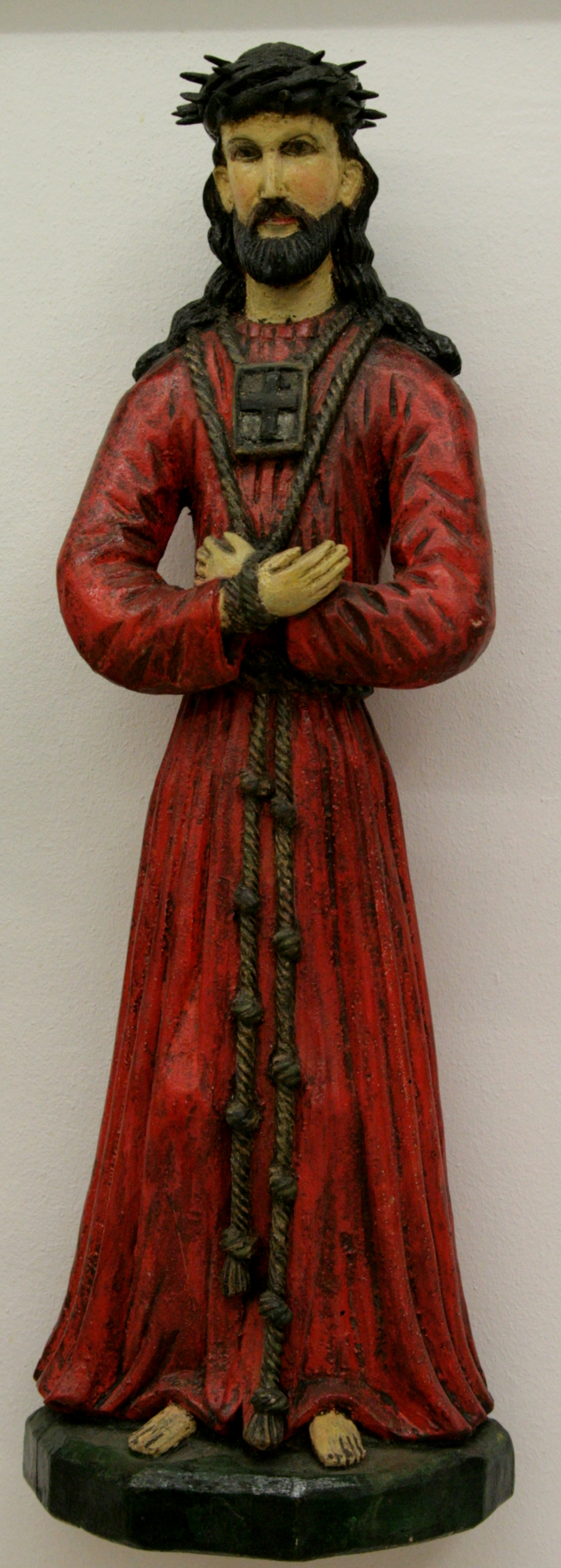 Chrystus Nazareński, Jeleń, małoposkie, XIX wiek, Muzeum Etnograficzne w Krakowie